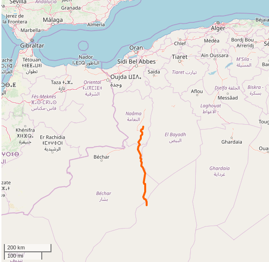 Carte de Oued Namous